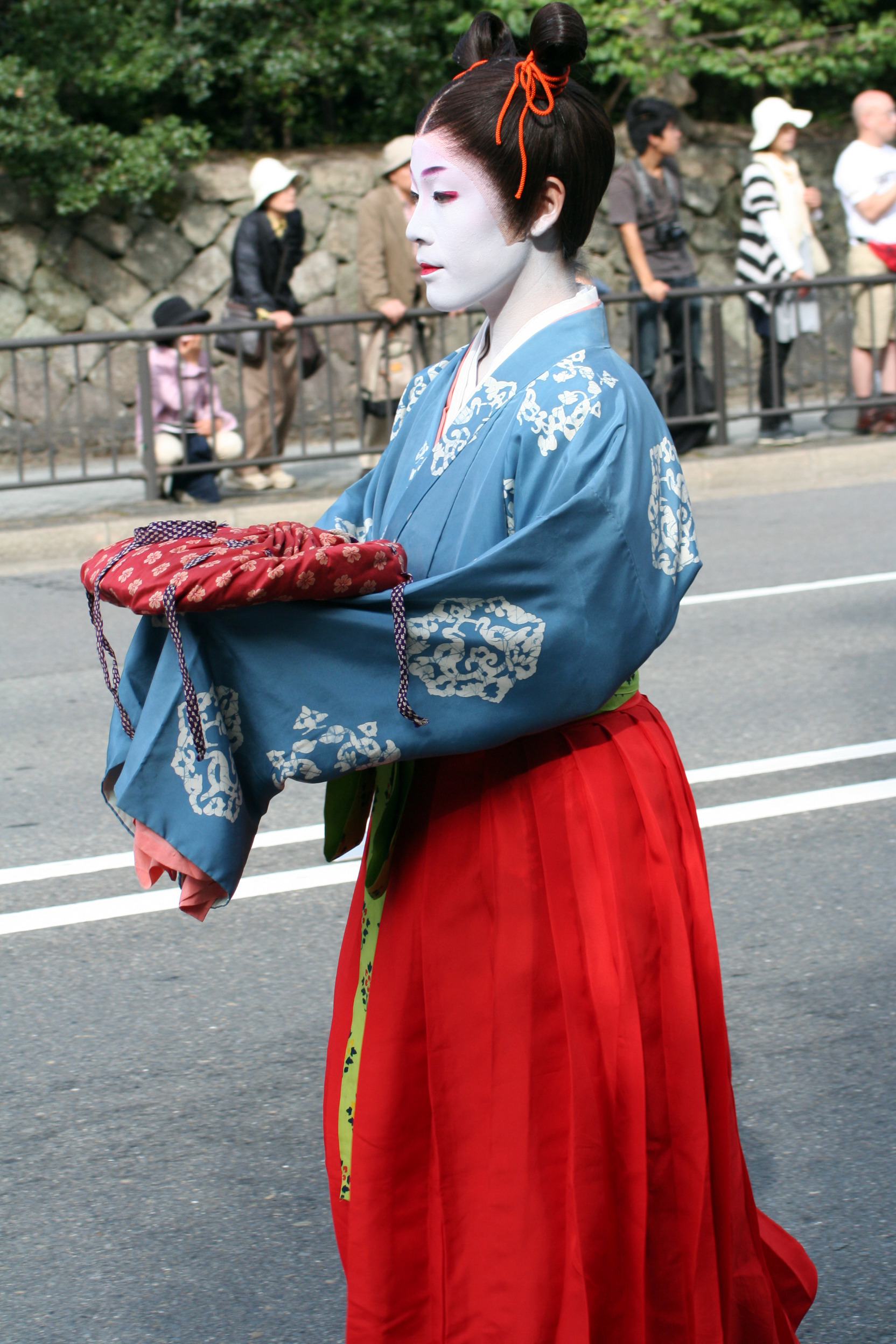 京都府京都市にて開催された時代祭。正午の御所から平安神宮までの行進の様子。2009年10月22日撮影。